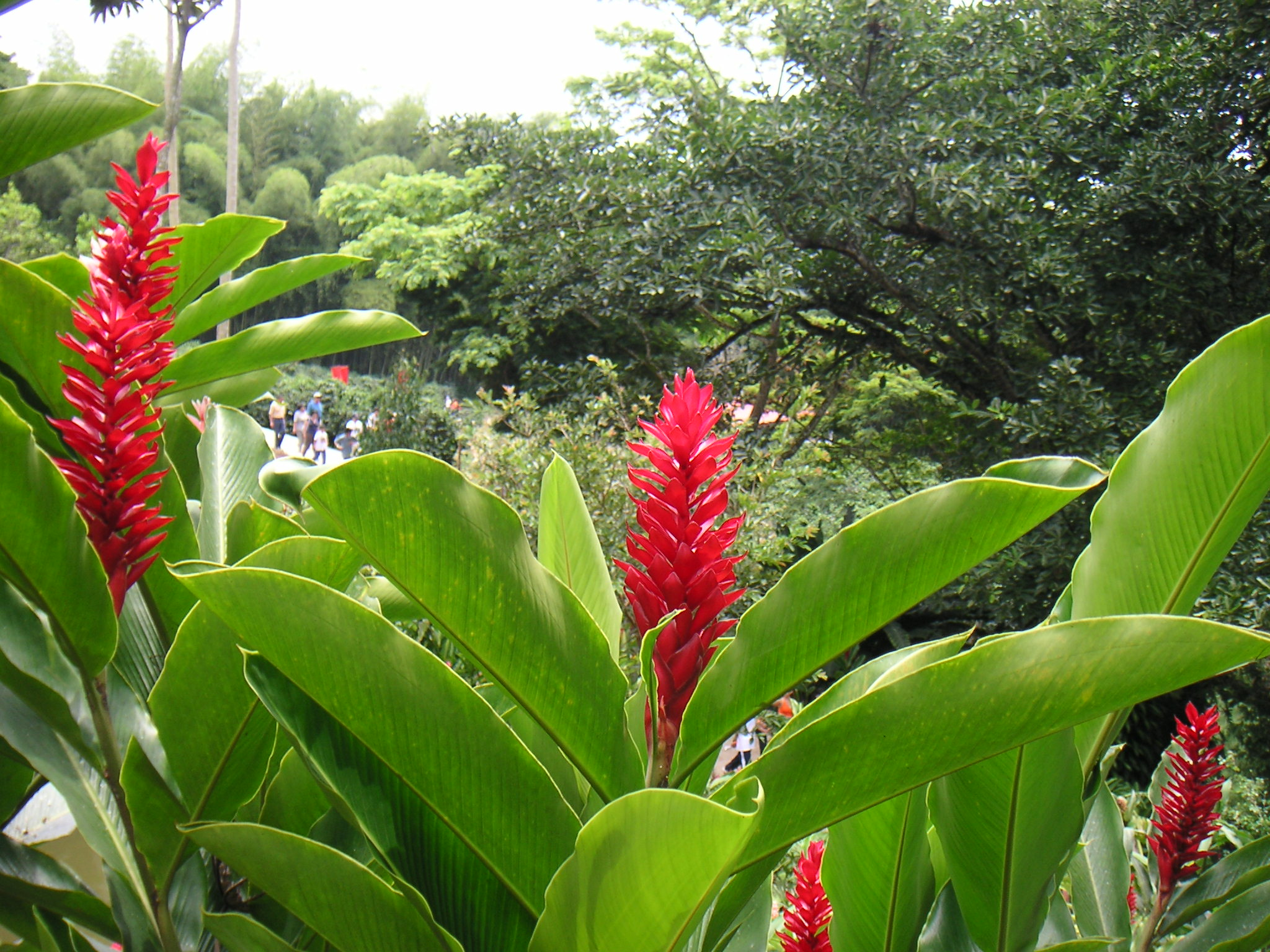 Alpinia purpurata, Zingiberaceae, Parque del Café, Quindio / Kolumbien